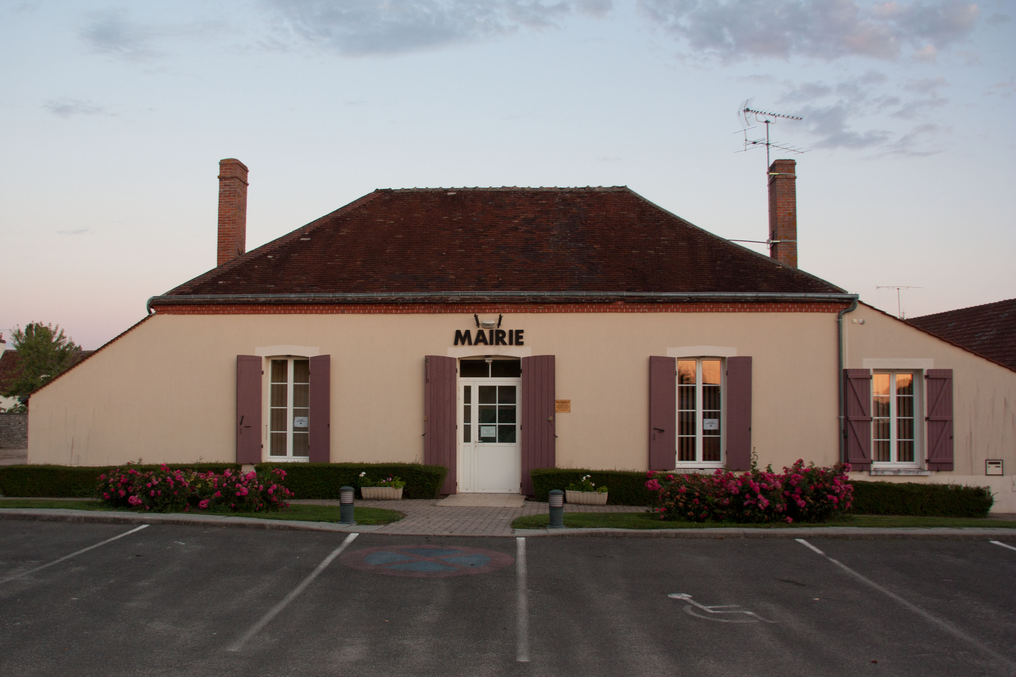 Mairie de Pressigny-les-Pins, Pressigny-les-Pins , Loiret, France